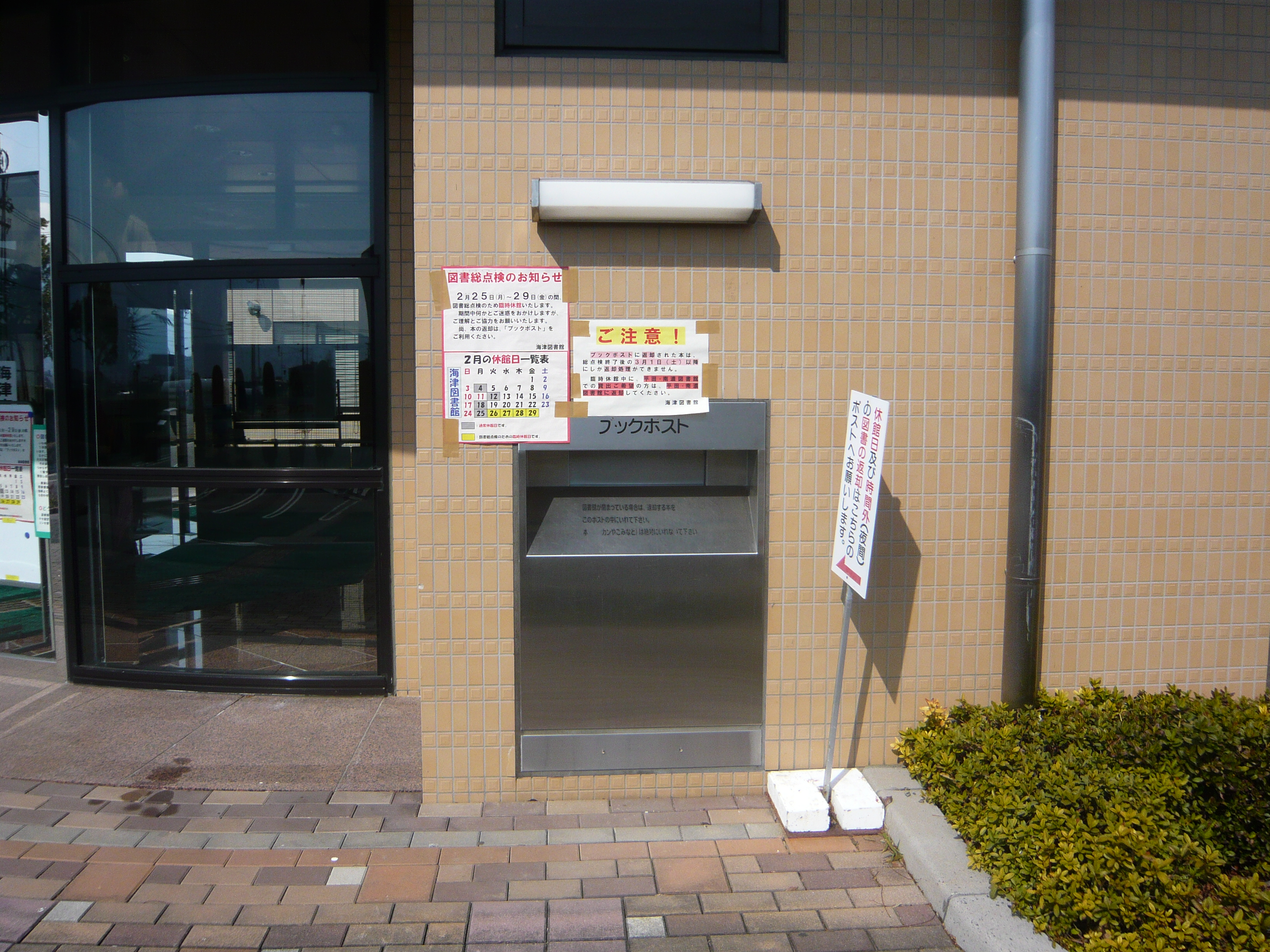 Kaizu City Public Kaizu Library（海津市立海津図書館）,Kaizu,Gifu,Japan（岐阜県海津市）で撮影。